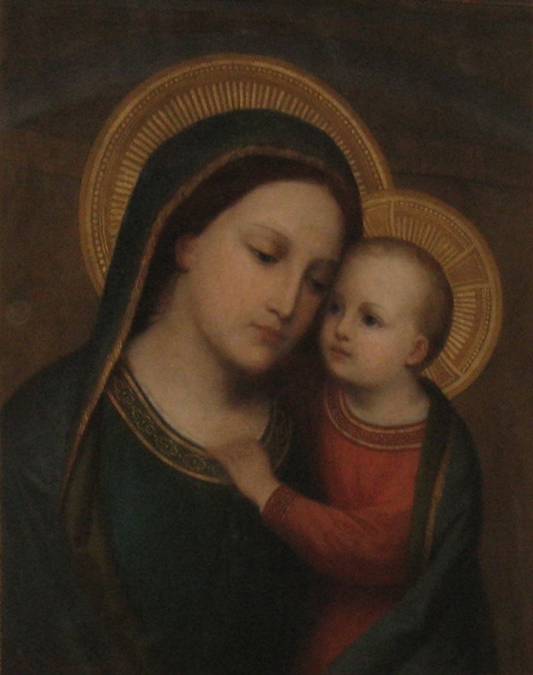 Madonnenbild der Mutter vom guten Rat ,Ölbild von Franz Thöne 1890